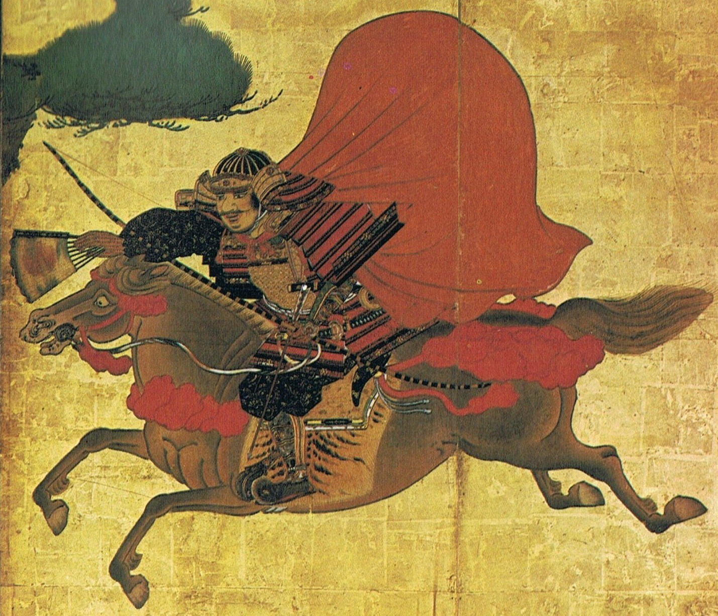 一の谷の戦いで平敦盛を呼び止める熊谷直実。